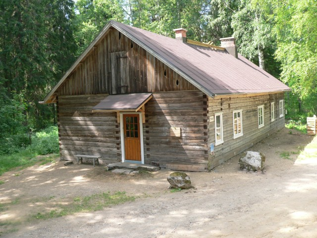 Rajalan kämppä kesällä 2005